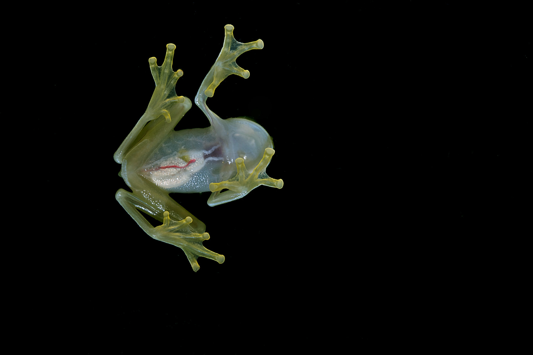 Centrolenidae: Hyalinobatrachium colymbiphyllum Río Frijoles, Parque Nacional Soberanía, Colón, Panamá